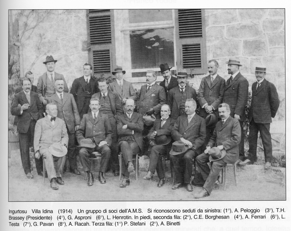 Fotografia di gruppo dei soci dell'AMS nel 1914. Si riconoscono seduti da sinistra: A. Peloggio, T. H. Brassey, Giorgio Asproni, L. Henrotin. In piedi, seconda fila: C. E. Borghesan, A. Ferrari, L. Testa, G. Pavan, A. Racah. Terza fila: P. Stefani, A. Binetti (Associazione mineraria sarda)